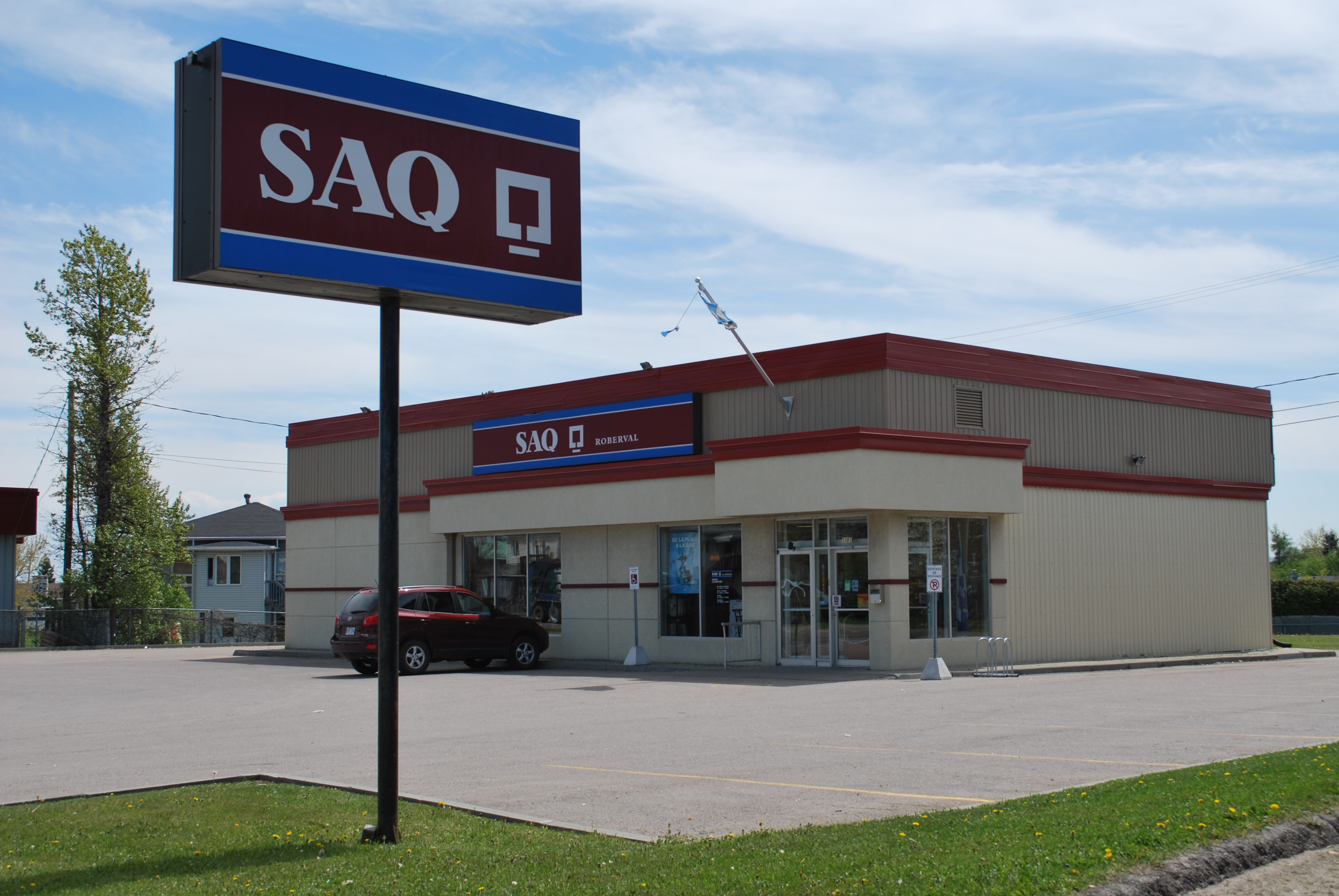 Succursale de la Société des alcools du Québec à Roberval, au Saguenay-Lac-Saint-Jean.